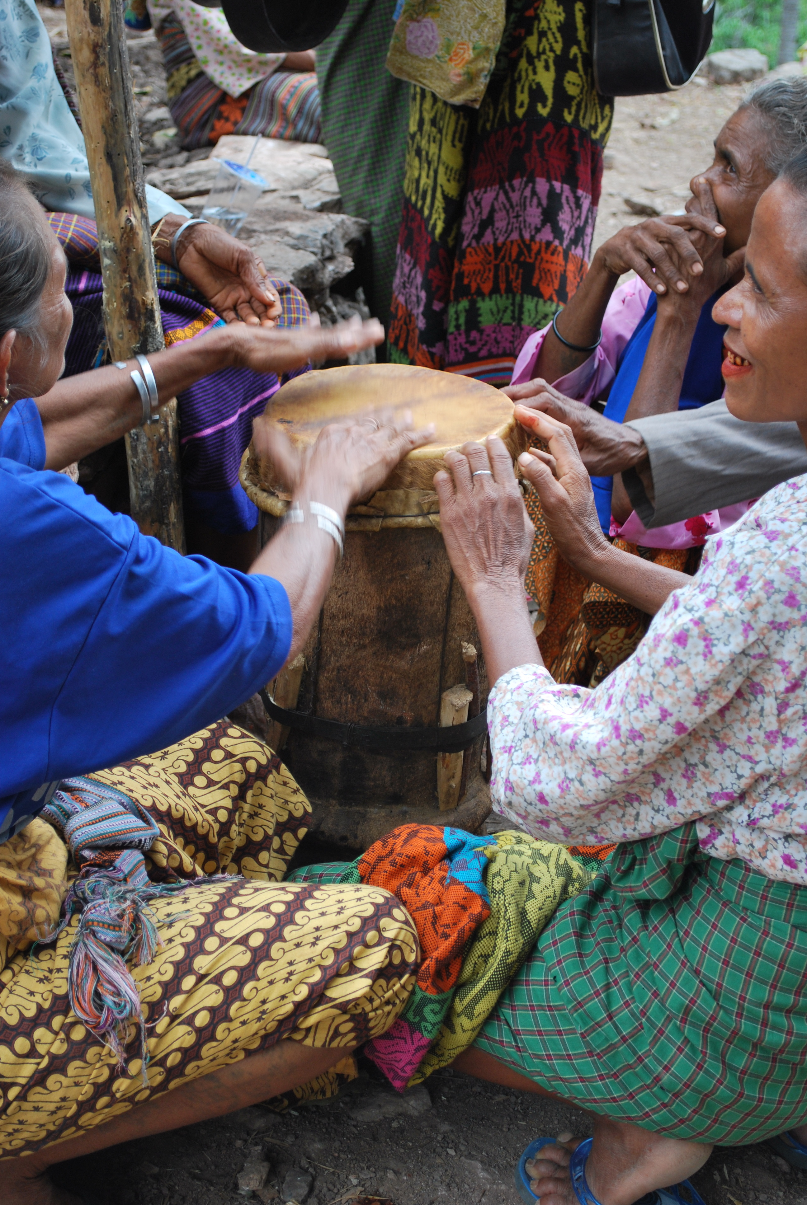 Tumin, Oessilo, Oecusse